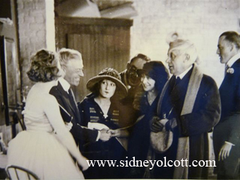 Maurice Maeterlinck en visite aux studios Golwyn à Culver City sur le plateau de Scratch My Back (1920), réalisé par Sidney Olcott.